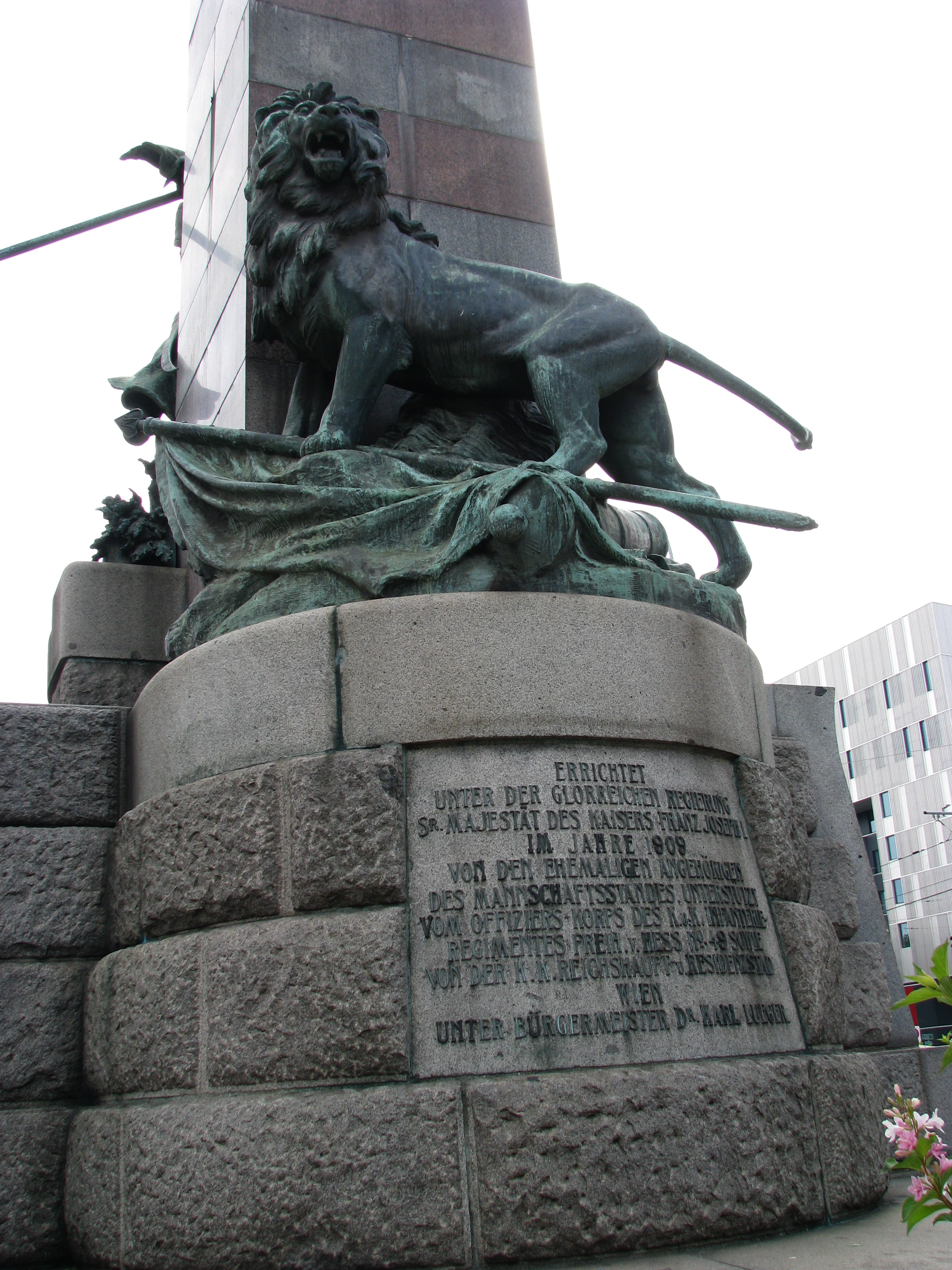 Ereignisdenkmal, Denkmal des niederösterr. Infanterie-Regiments Nr. 49, 13. Mai 1809, Hesser-Denkmal